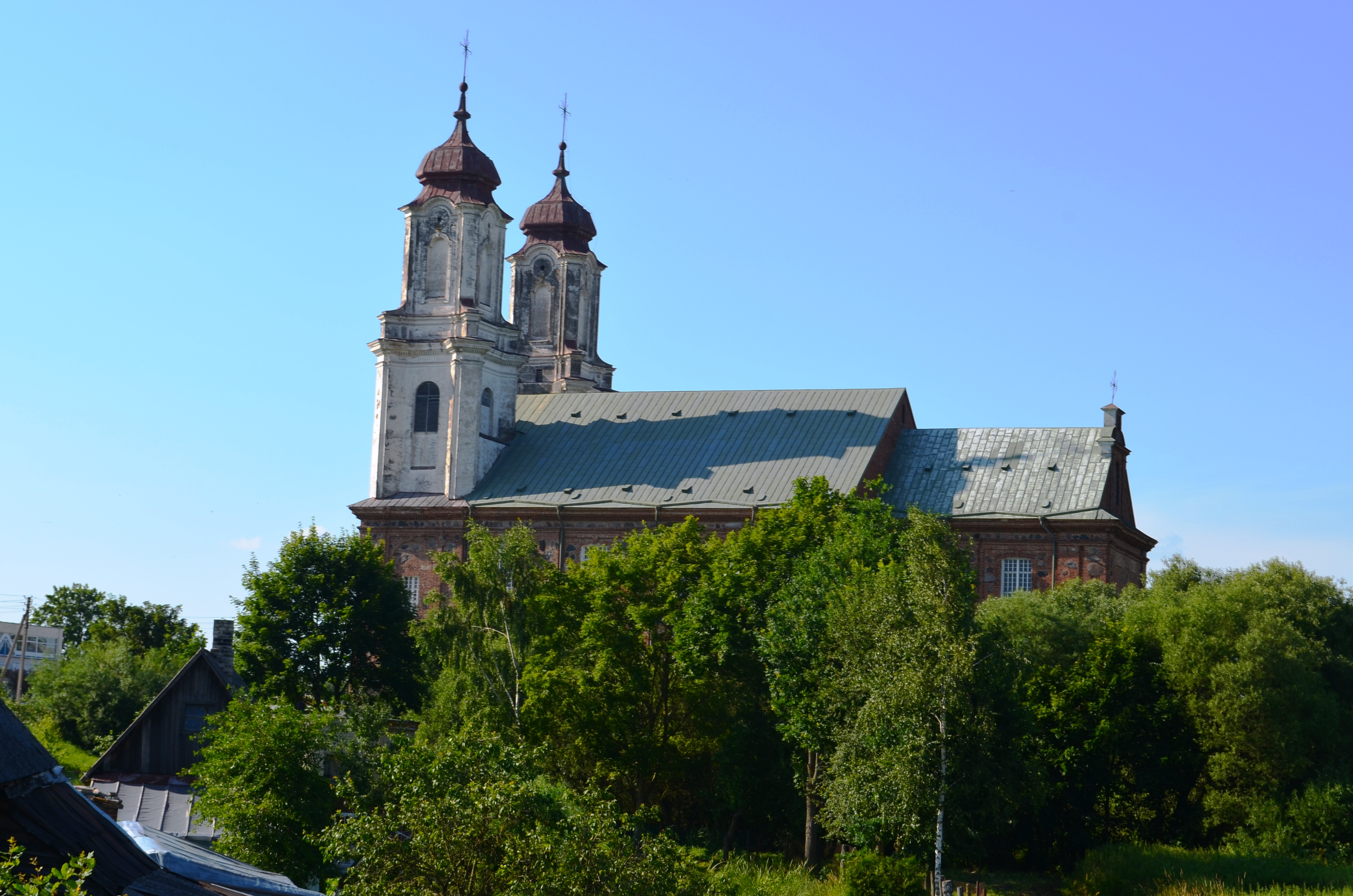 Dotnuvos bažnyčia, Kėdainių raj.